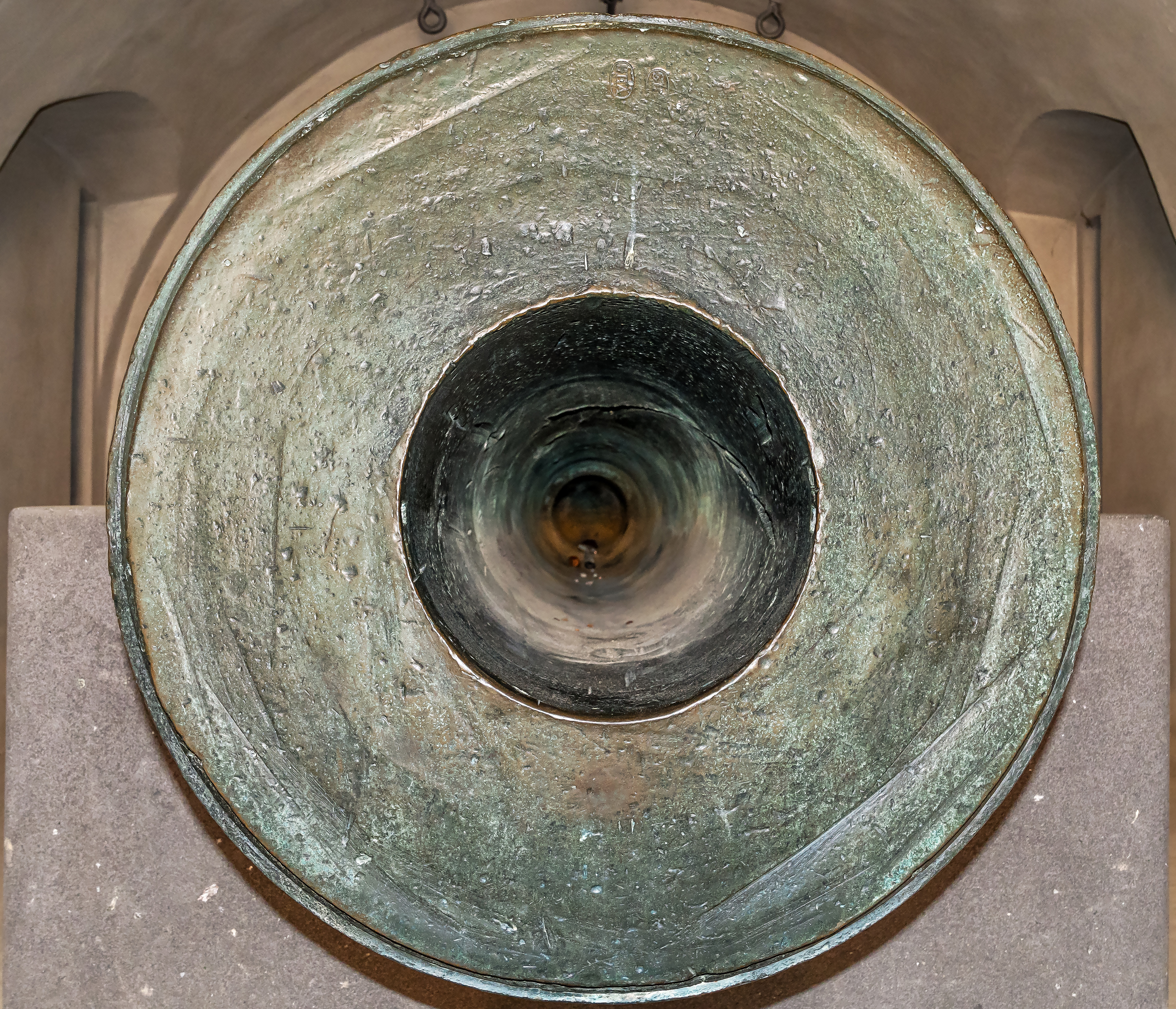 Rohrmündung der Kanone Greif, die in der Festung Ehrenbreitstein aufgestellt ist.